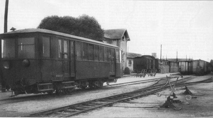 Une automotrice Renault-Scemia type RS1 en gare de Soissons Saint-Waast.